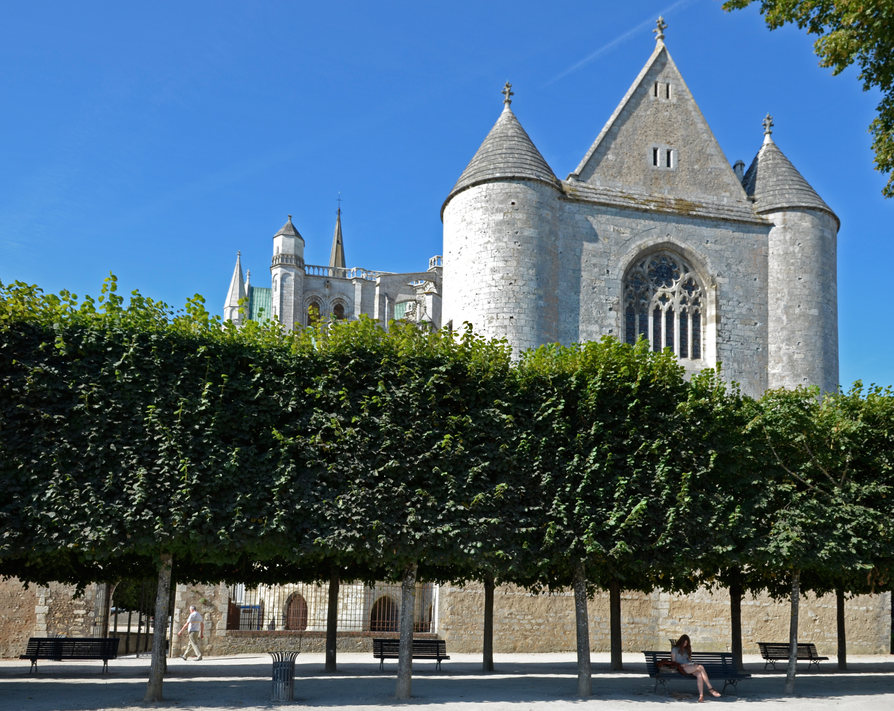 Chapelle Saint Piat de la Cathédrale de Chartres vue depuis le jardin public - Chartres, Eure-et-Loir .